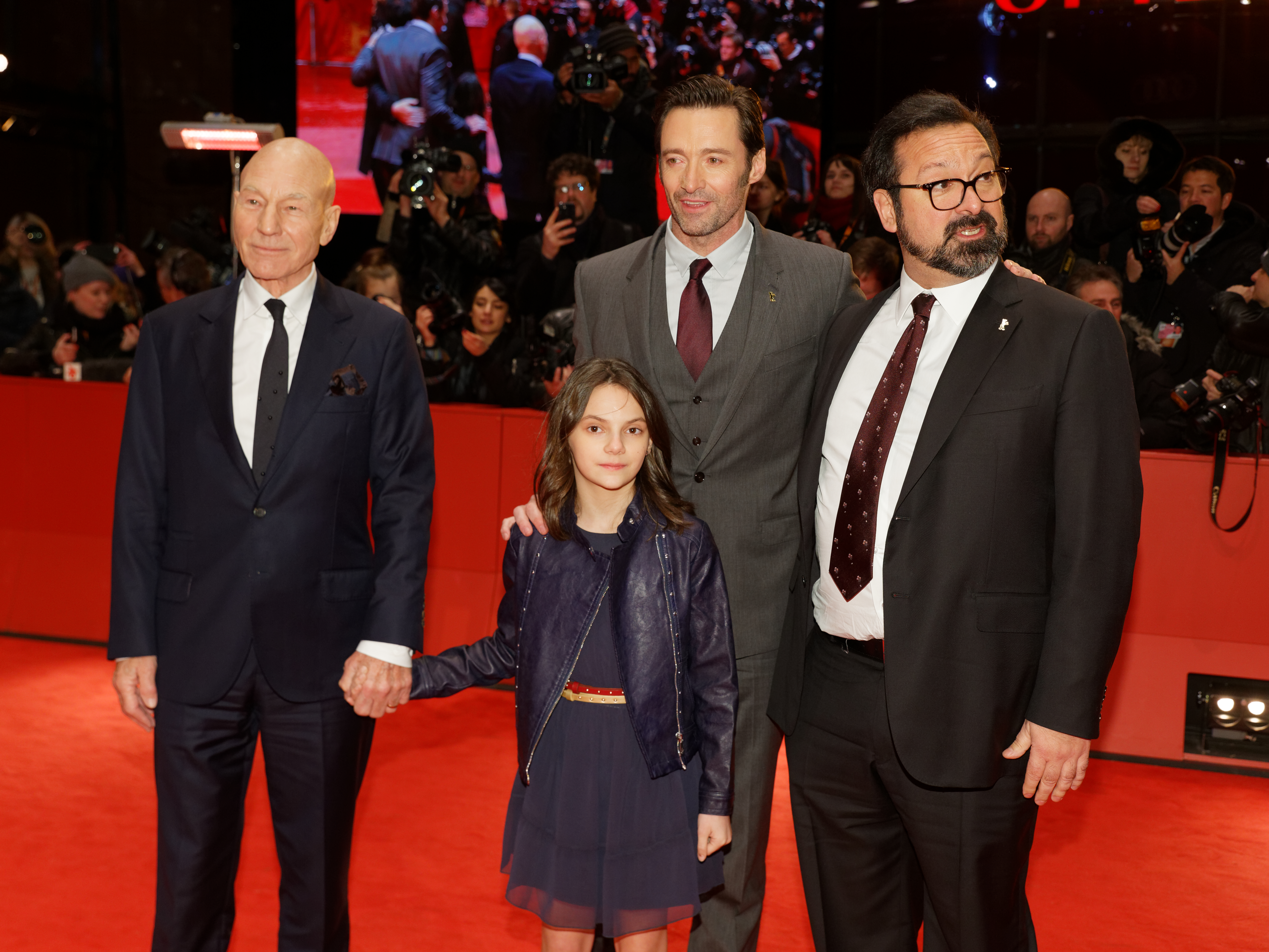 James Mangold und Cast auf dem roten Teppich zur Weltpremiere von Logan bei der Berlinale 2017